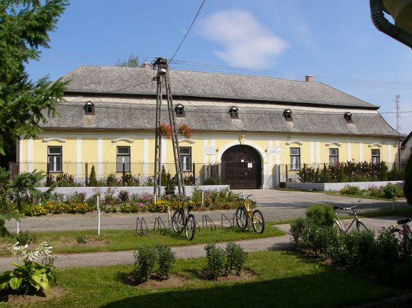 Érsekvadkerti római katolikus parókia